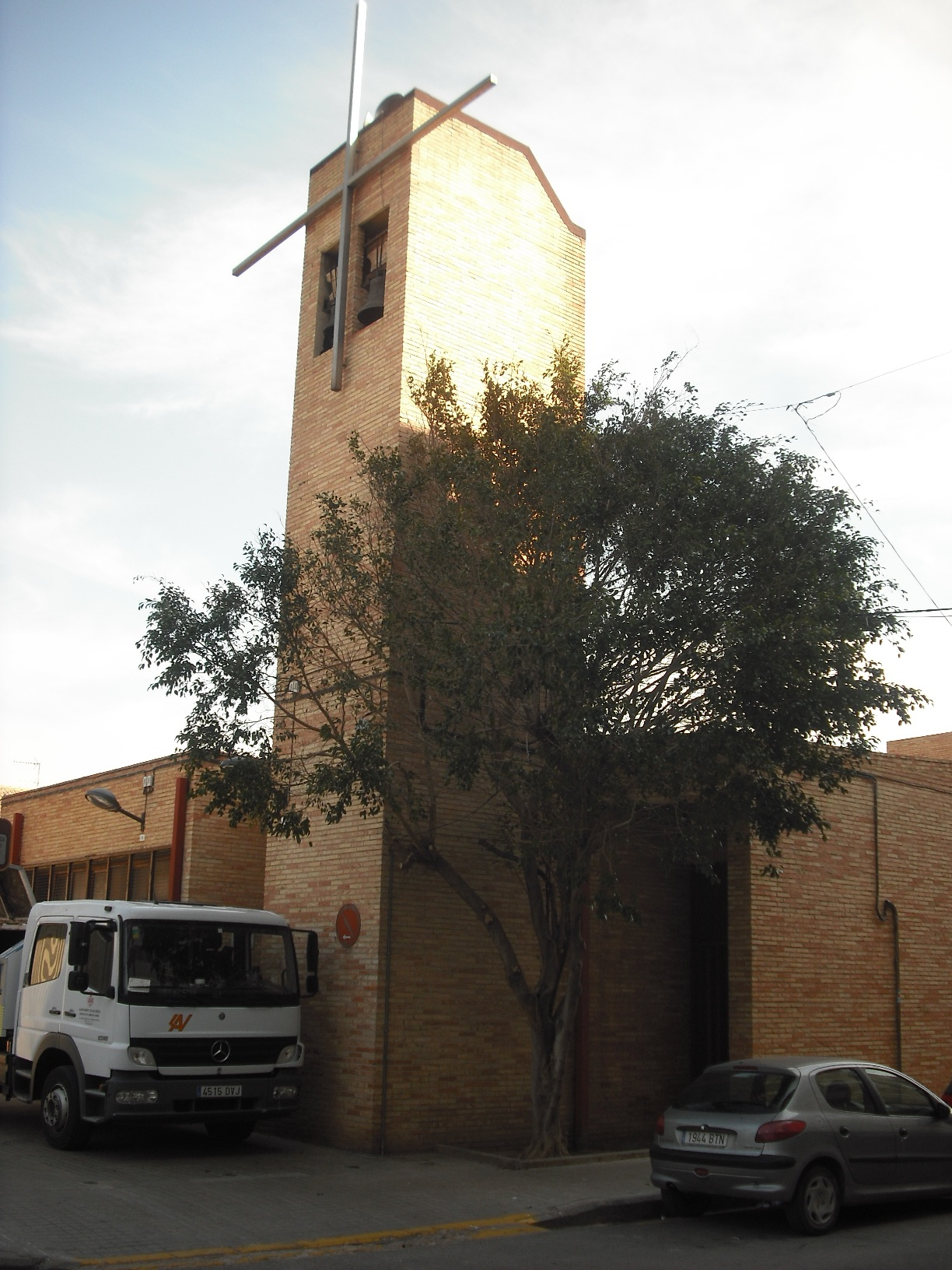 Nova església de Pinedo, al haver sigut destruida l'antiga durant la construcció del nou llit del riu Túria.